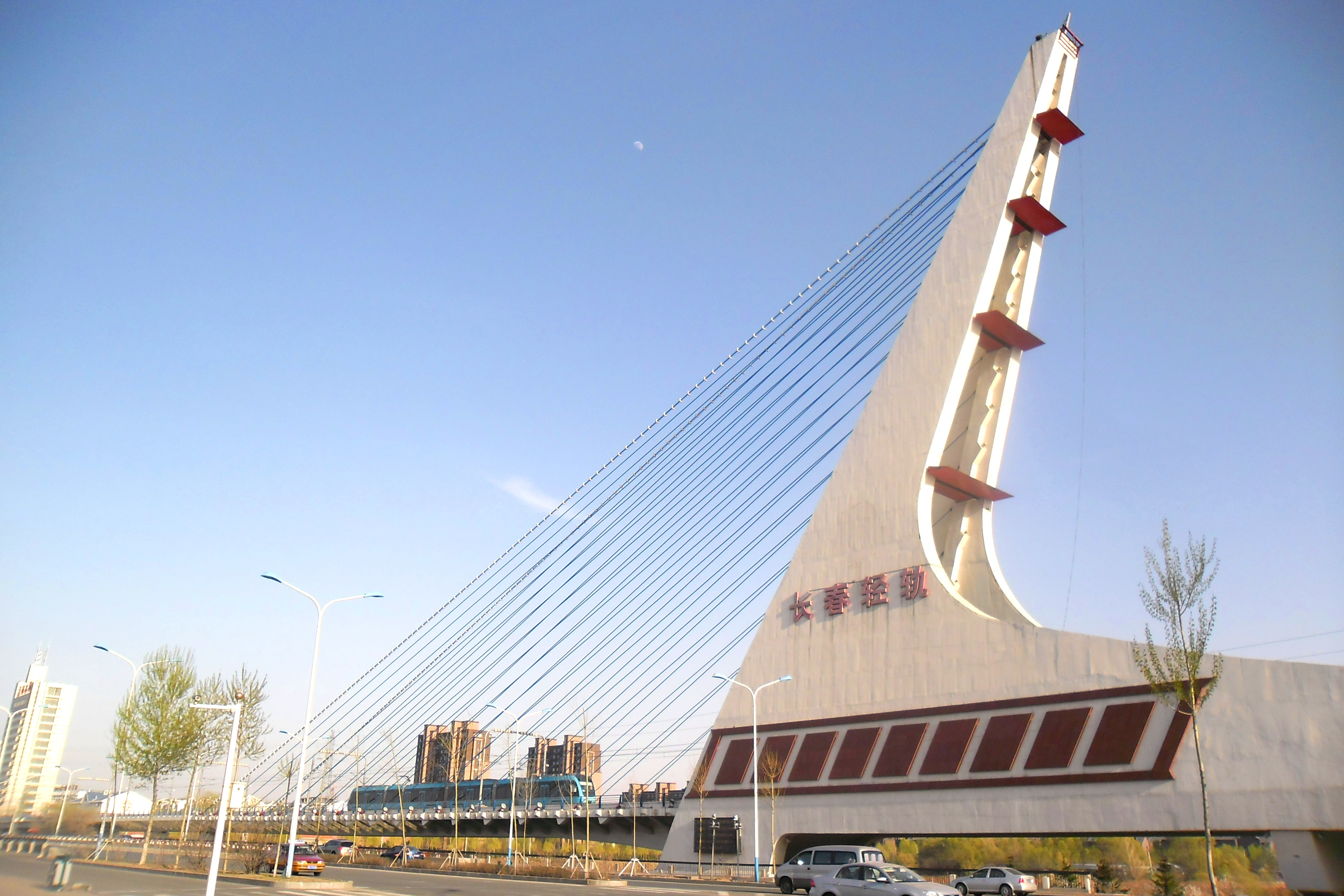 中文（中国大陆）: 长春轻轨3号线